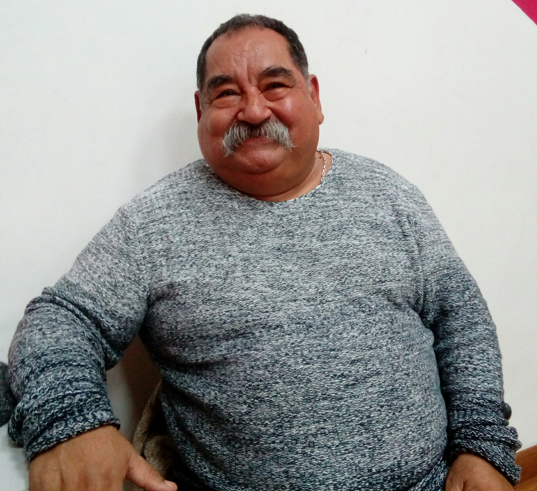 Imagen recortada de Ramón García Monteagudo en una clase de actuación.